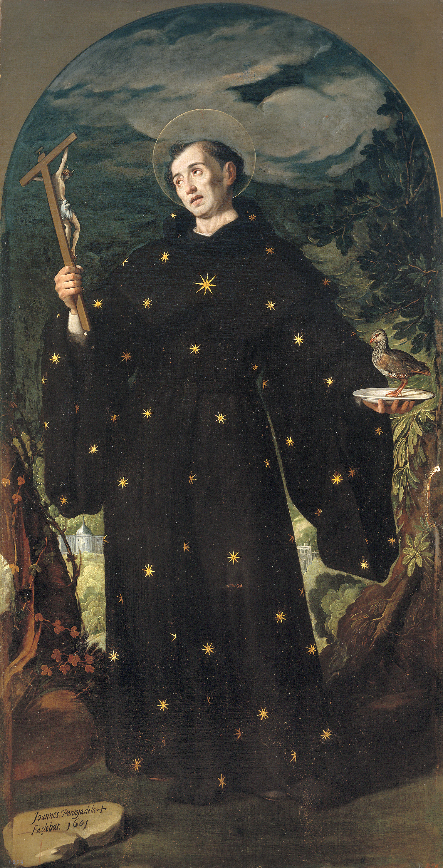 Juan Pantoja de la Cruz, San Nicolás de Tolentino, 1601, óleo sobre lienzo, 261 x 133 cm. Museo del Prado (Madrid, España)